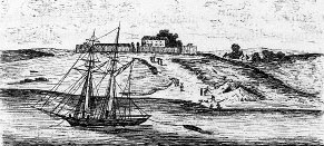 Fort de Mérinaghen sur le lac de Guier (Sénégal) (illustration issue de Côte occidentale d'Afrique, 1890, du Colonel Frey) [Bandeau en tête du chap.III p.107 :] [Cote : Réserve A 200 386]